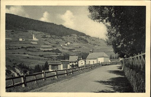 Burvagn im Oberhalbstein auf Fotografie von 1927